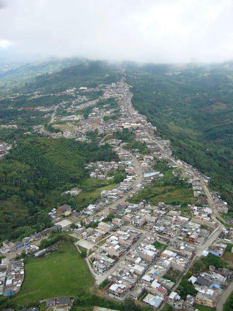 Se Tomo Desde Mi Avión